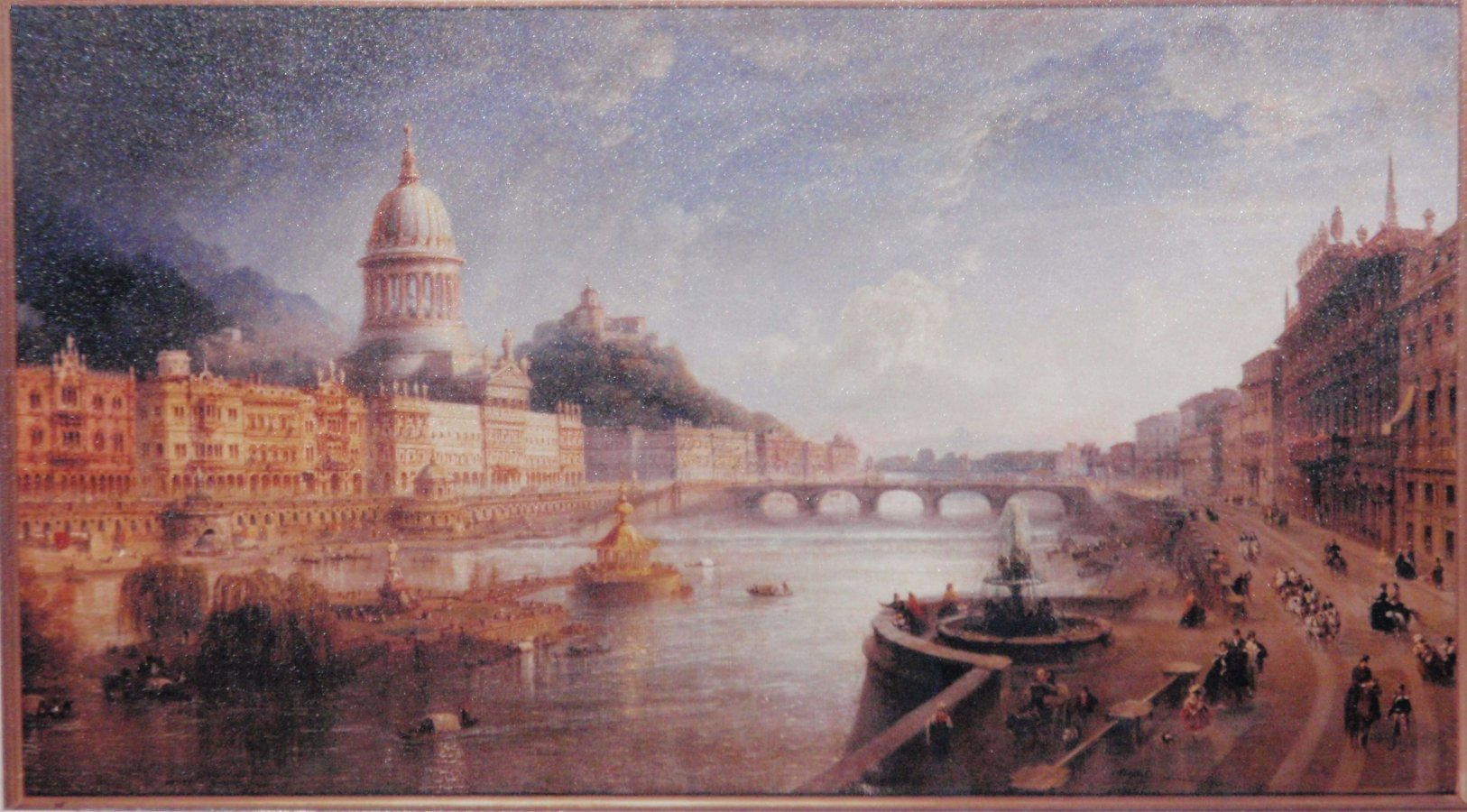 Progetto ideale di Borgo Po Torino Italia Quadro di Carlo Bossoli